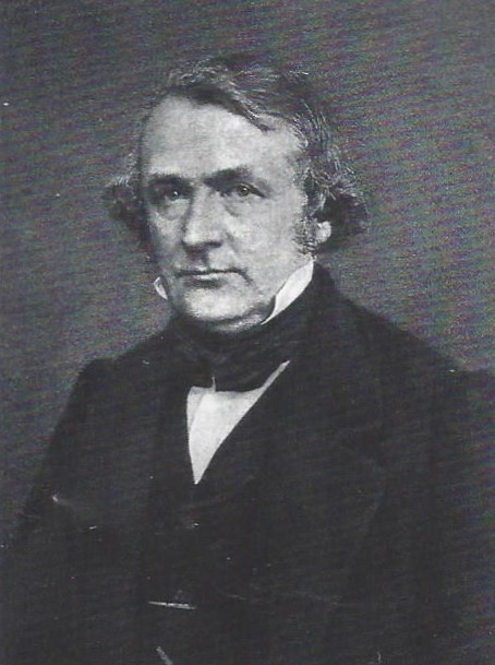 Porträtfotografie von Leberecht Dreves